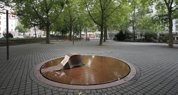 Wunderschöner Brunnen am Kopernikusplatz